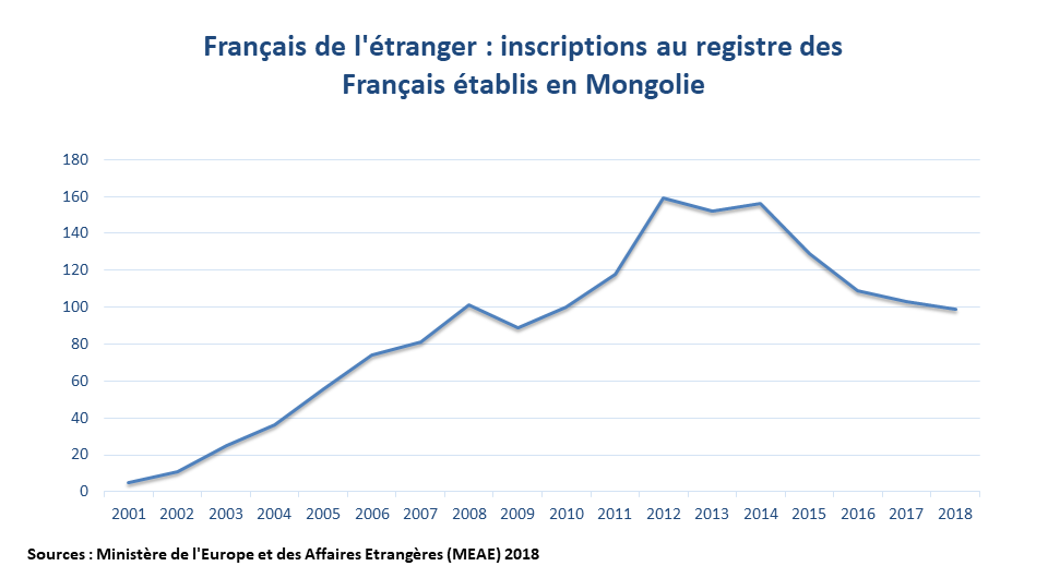 Nombre de Nombre de Français inscrits au registre du Ministère des affaires étrangères, établis en Mongolie. Dernière actualisation : 2018.